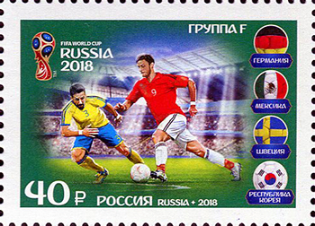 Группа F.